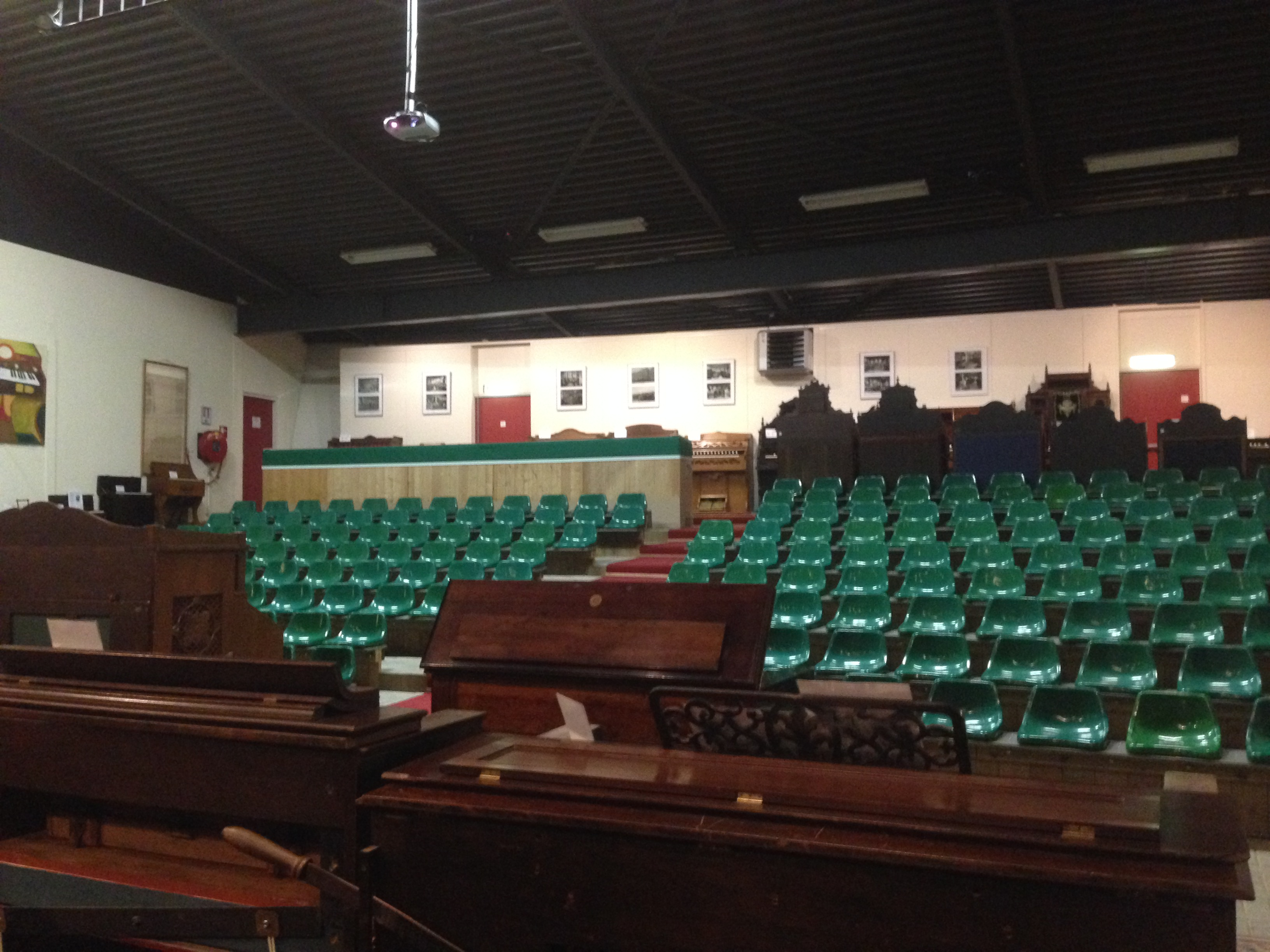 Harmonium Museum Nederland, Veenpark, Barger-Compascuum, Netherlands